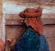 Rolin-Madonna: Vermutliches Selbstporträt Jan van Eyks